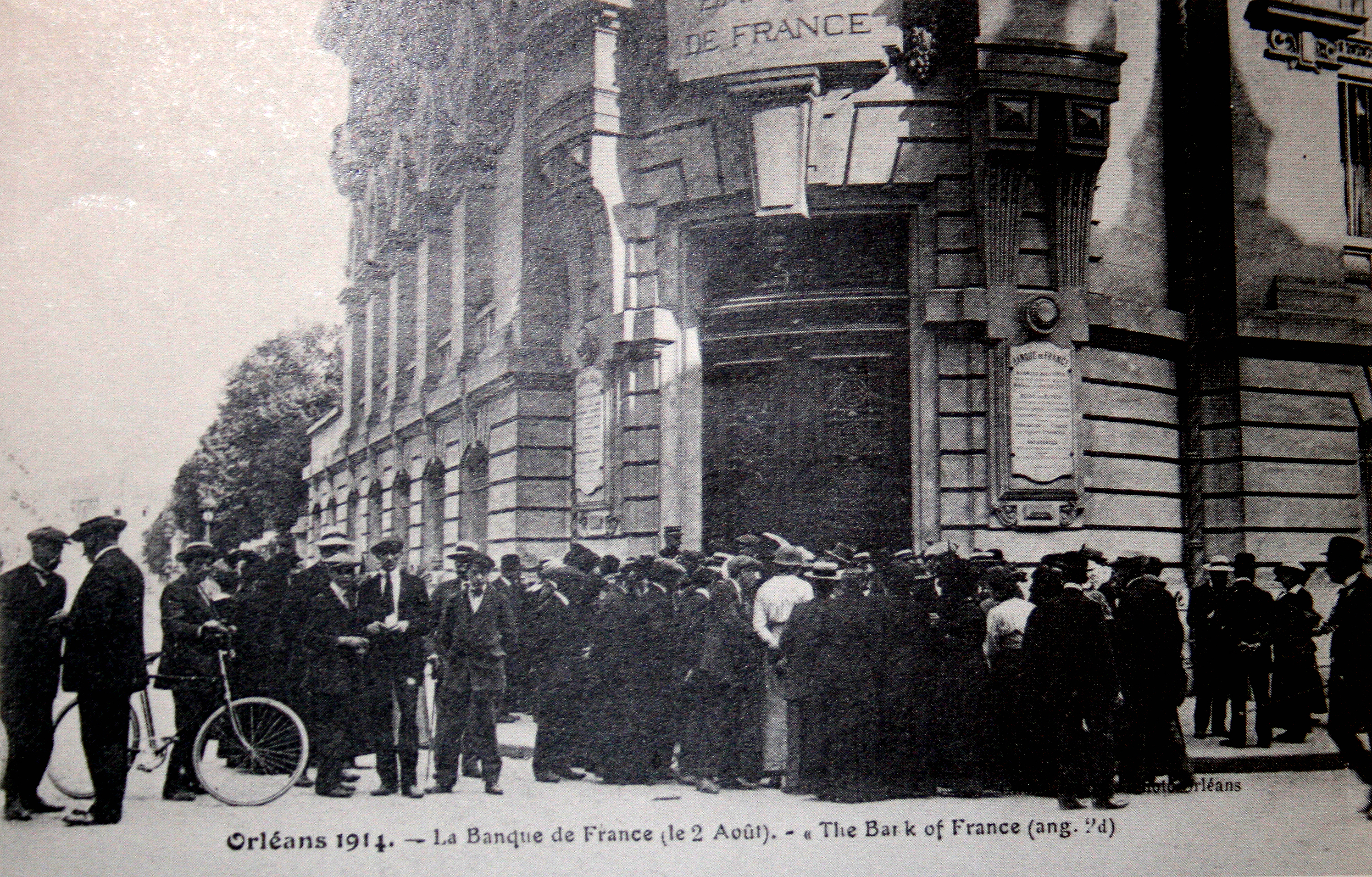 File d'attente devant la Banque de France d'Orléans, le 2 août 1914, jour de la mobilisation générale en France.